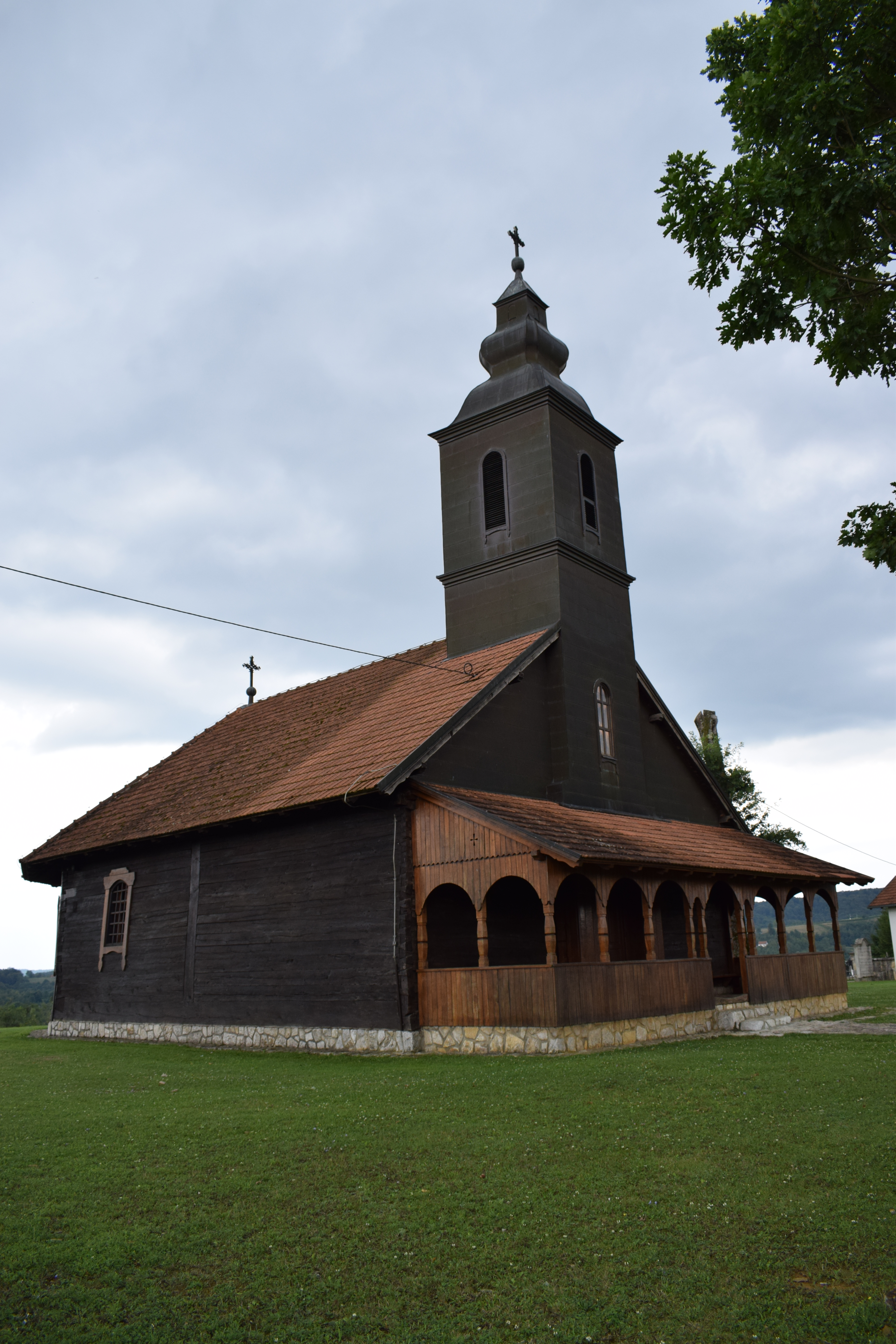 Црква брвнара у Бусновима посвећена је Вазнасењу Господњем. Тачно вријеме градње се не зна јер би 1870. година, која се налази урезана изнад улазних врата, могла бити година градње или једне од бројних обнова. Сигурно је да је главни мајстор био Симо Стојић из Буснова. По широкој заравни, гдје се налази, у народу је познатија као црква Спасовица. Дрвене греде су изворно биле положене на земљу, а у једној значајнијој санацији, 1924. године, подигнуте су на камени подзид. Велика обнова и санација цркве извршена је у периоду од 1994.-1995. године. Урађен је нови иконостас којег је осликао академски сликар из Бањалуке, Љубомир Гајић. Црква брвнара у Бусновима припада парохији Буснови коју чине села Буснови, Томашица и дио Криваје. Пред црквом се за Преображење одржава велики народни збор. У Бусновима је рођен и крштен садашњи Еписком бањалучки Јефрем.